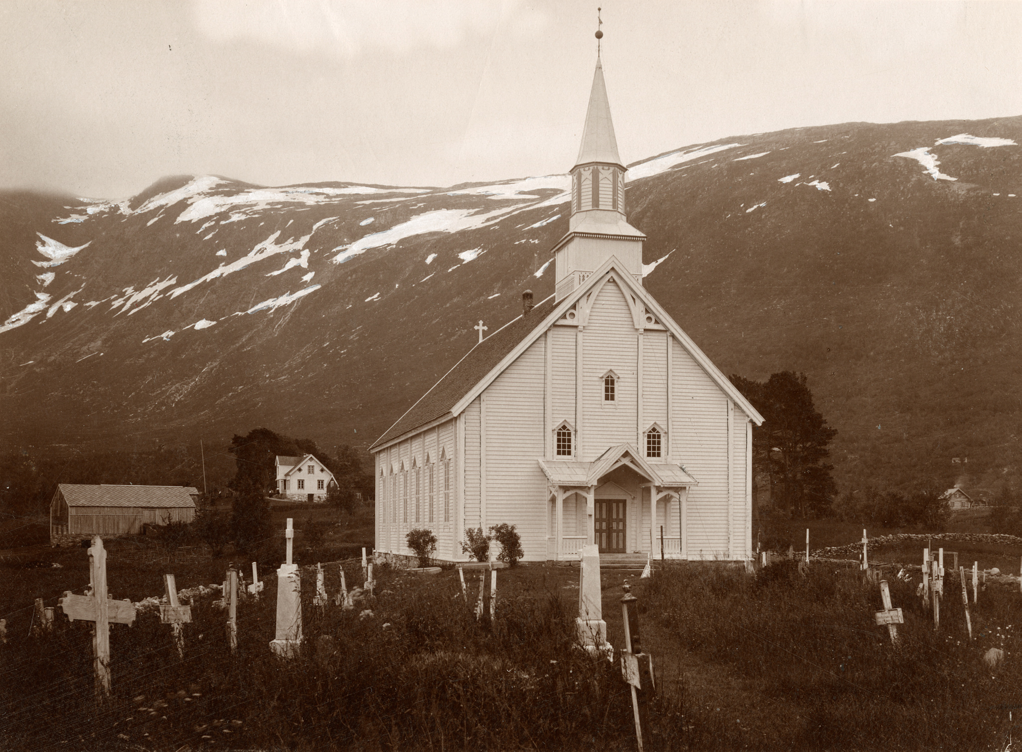 Davik kirke fotografert av Christian Christensen Thomhav (1857–1937). Fra Kulturminnebilder.no.